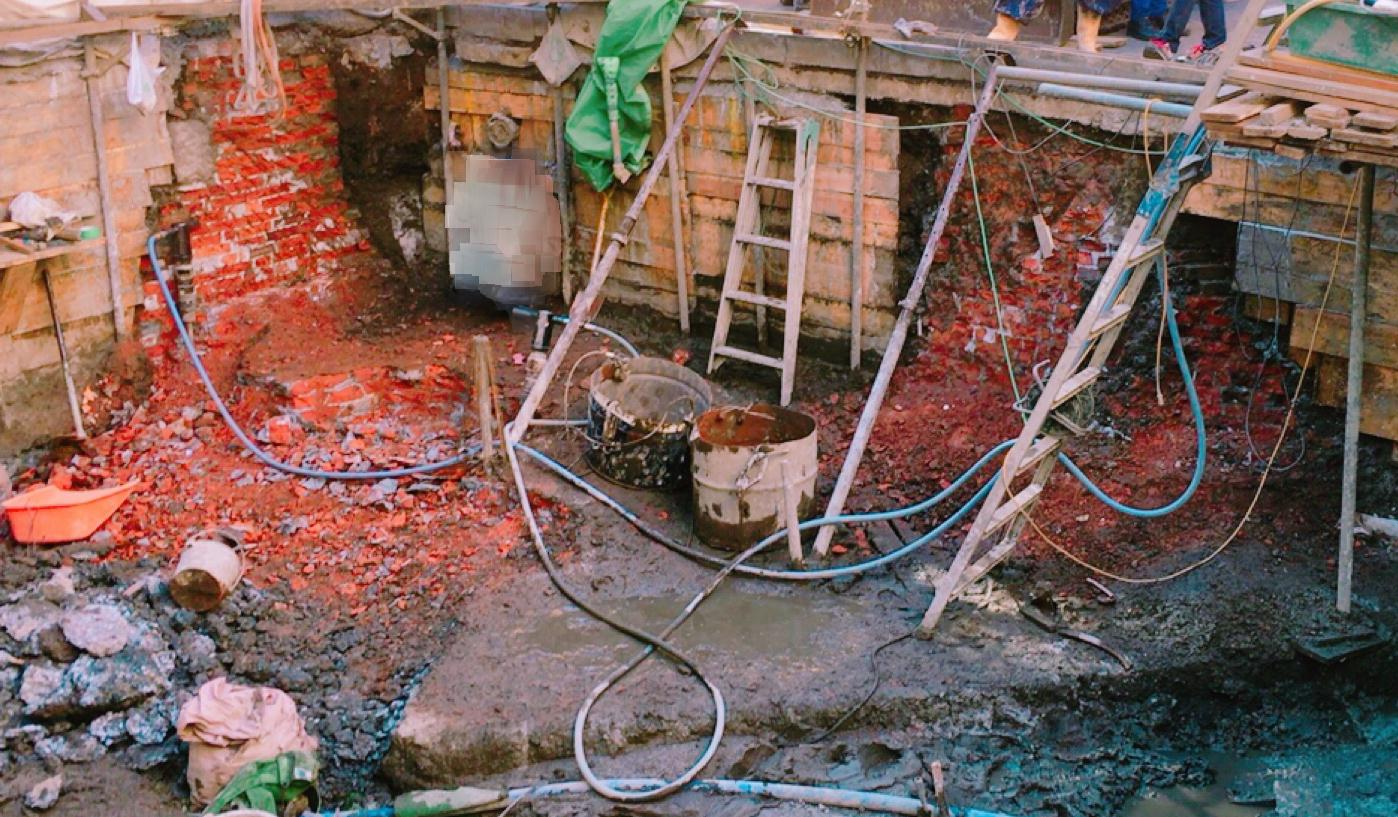 凌雲閣の基礎部分。2018年2月の建築基礎工事によって発見されたもの。手前のラインが八角形の基礎で左右に見えるレンガが積み上げられていた。